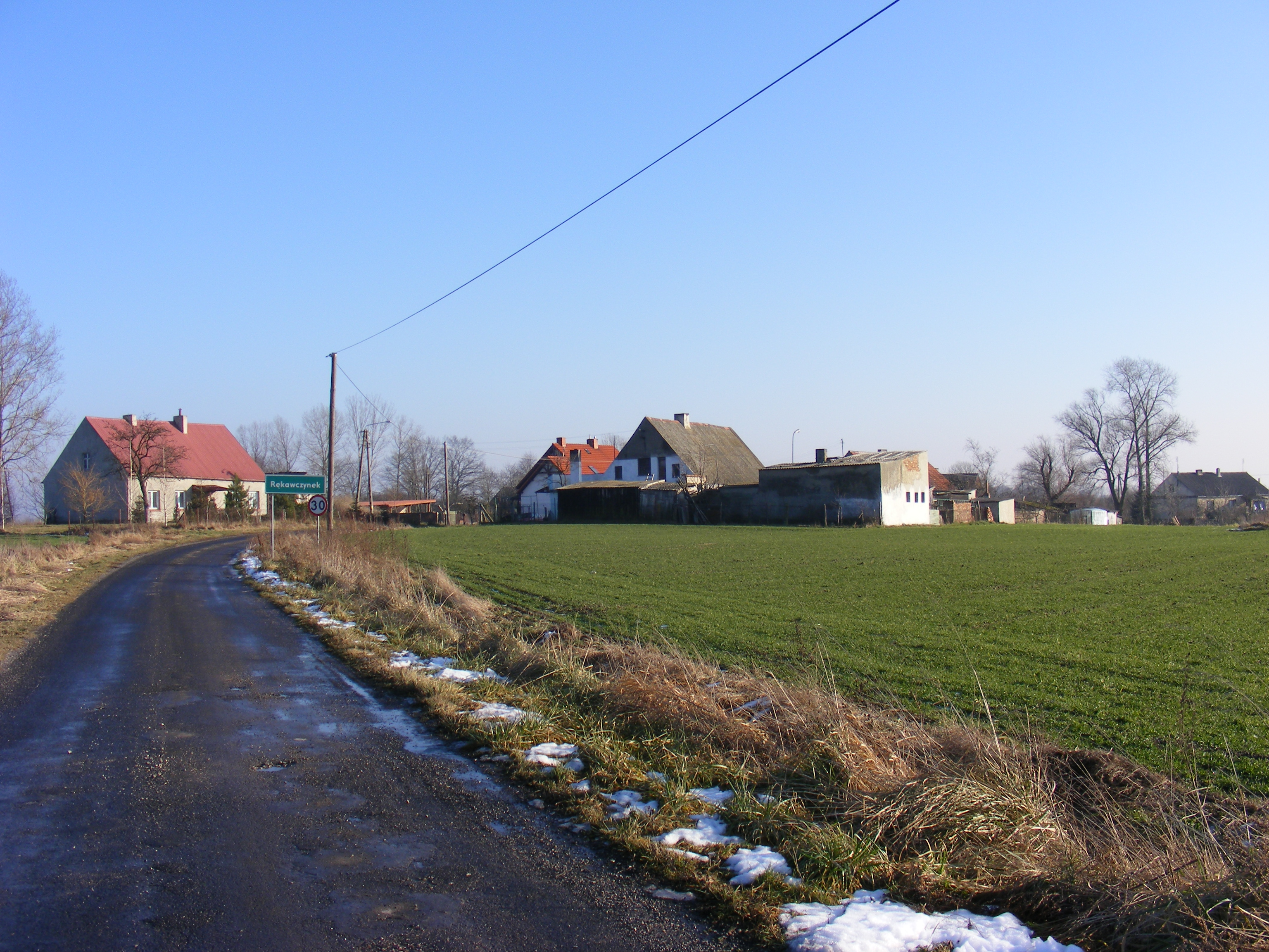 Rękawczynek, widok ogólny